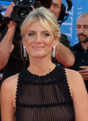 Elle Fanning et Mélanie Laurent au festival de Deauville